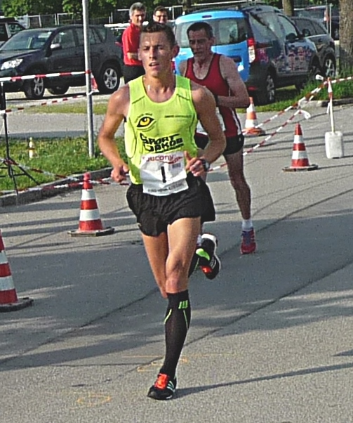 Tobias Schreindl bei den Bayer. 10 km Straßenlaufmeisterschaften 2016